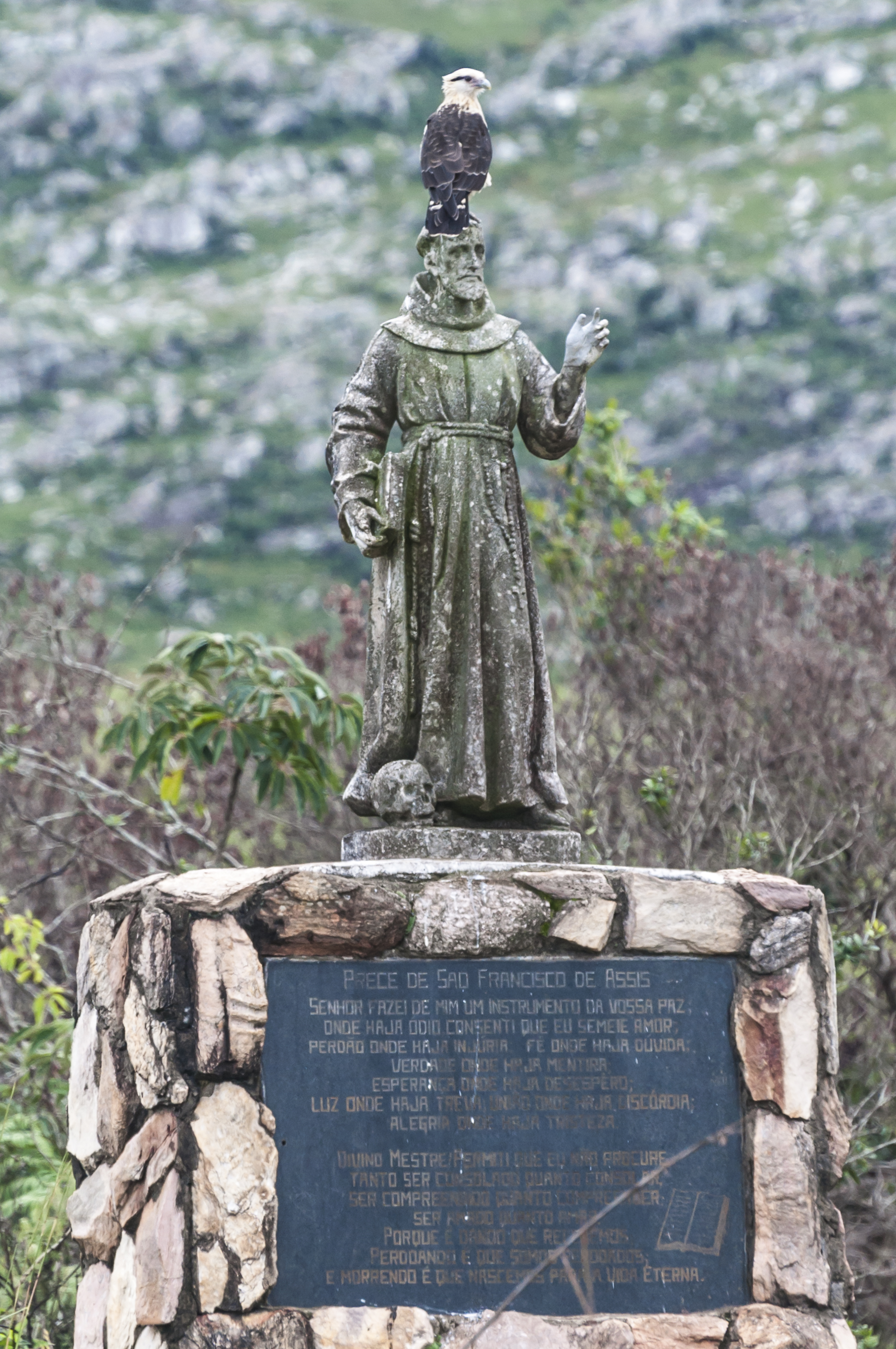 Gavião carrapateiro pousado na cabeça da estátua de São Francisco de Assis , na nascente do Rio São Francisco ,dentro do parque nacional da serra da canastra